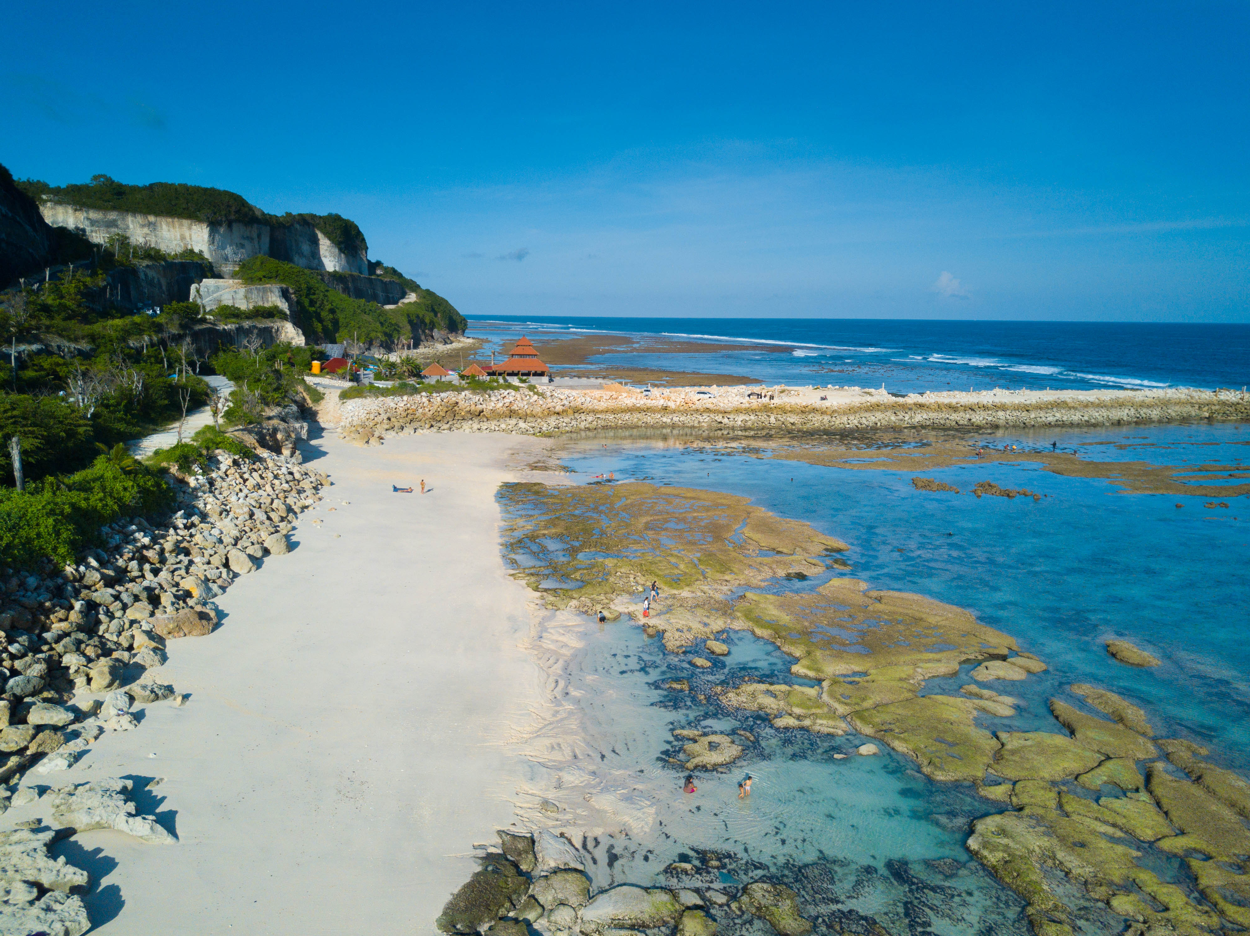 Pantai Melasti terletak di bagian selatan Pulau Bali. Area ini terkenal dengan pantai pasir putih yang masih bersih. Pantai Melasti sering digunakan untuk upacara Melasti setiap menjelang Hari Raya Nyepi.